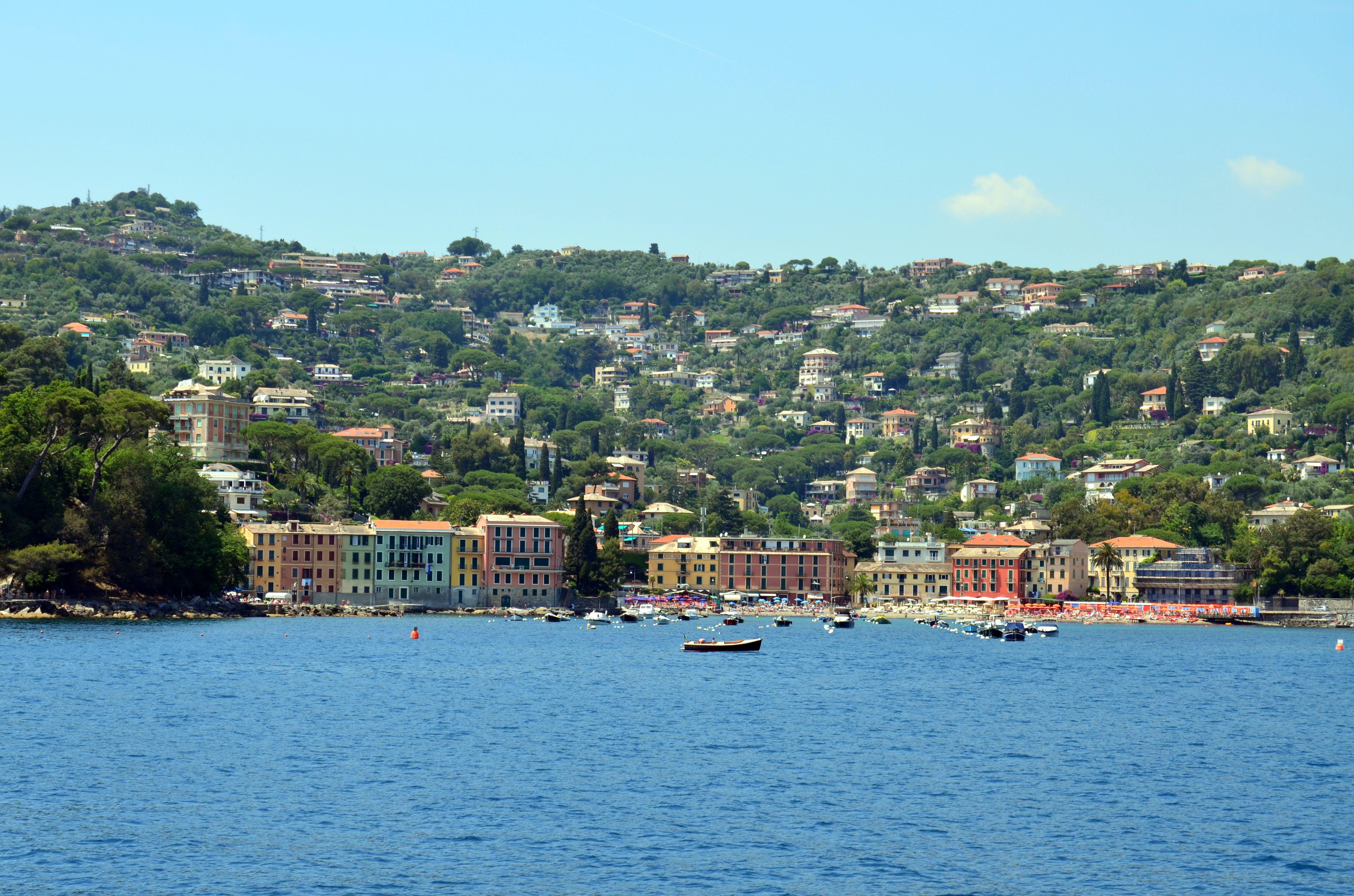 Panorama dal mare di San Michele di Pagana, frazione di Rapallo, Liguria, Italia